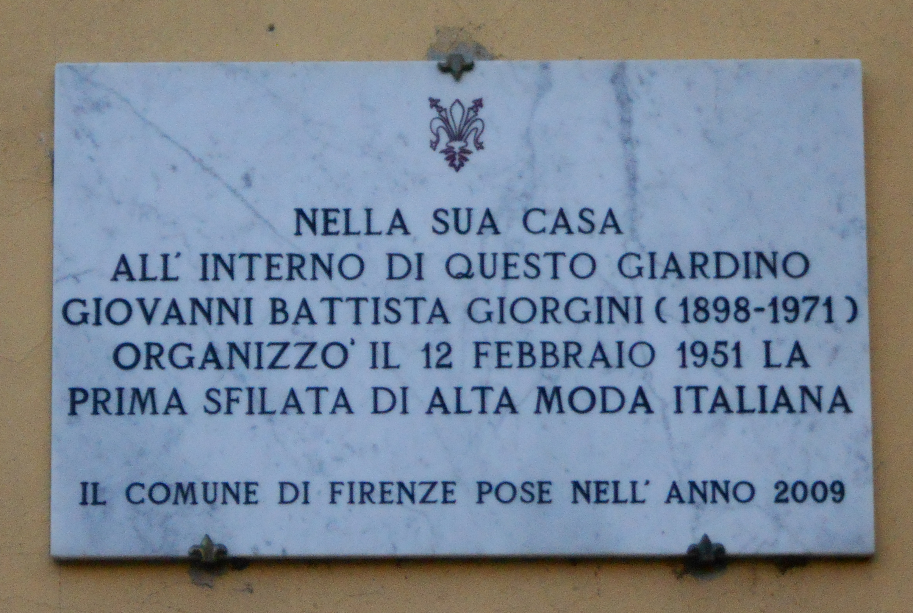 Giovanni Battista Giorgini, prima sfilata di alta moda italiana, via dei Serragli, Firenze (Giardino Torrigiani)